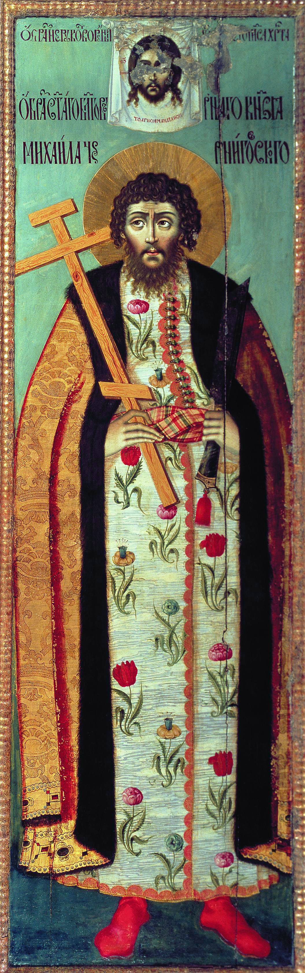 Saint prince Michael Chernigov. св. князь Михаил Черниговский